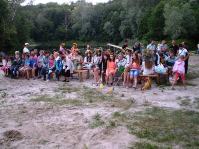 Свято Івана Купала (перегонівський пляж )